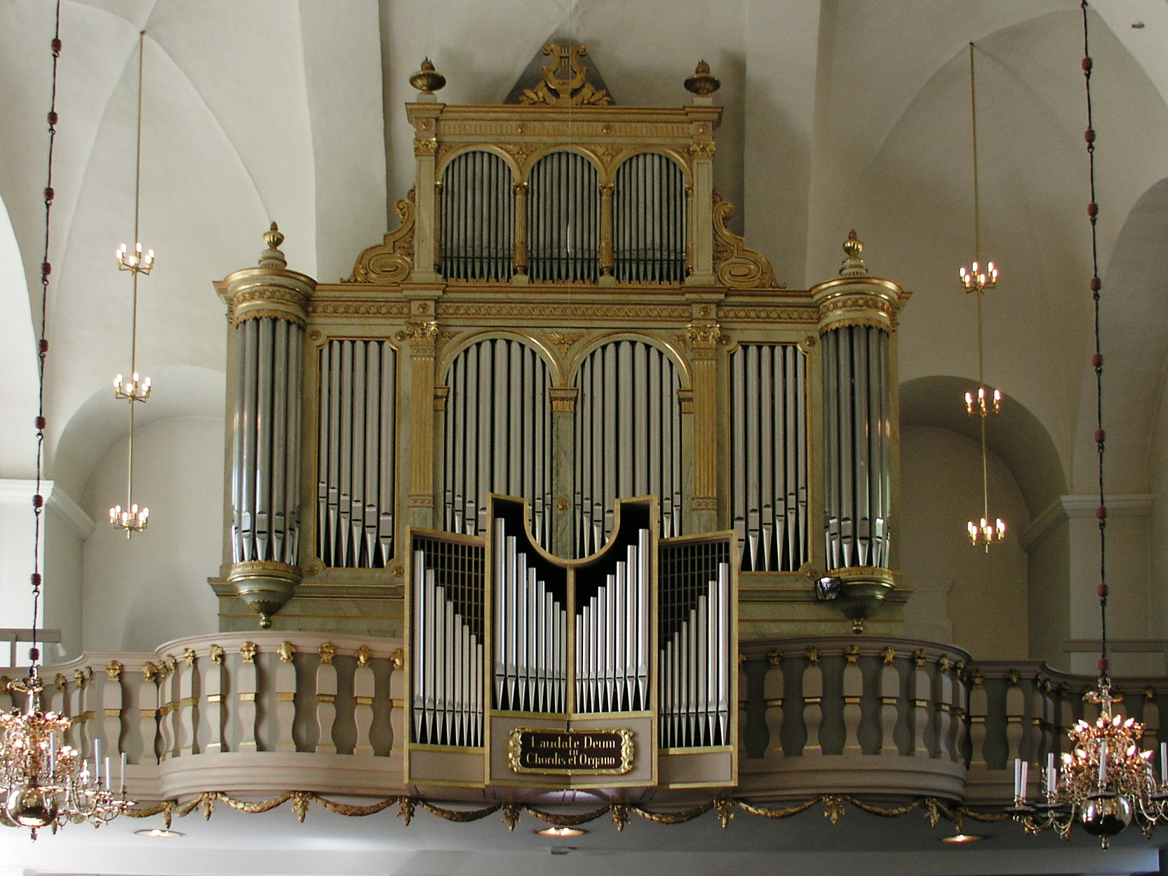 Karlstads domkyrka / Cathedral of Karlstad. Organ.